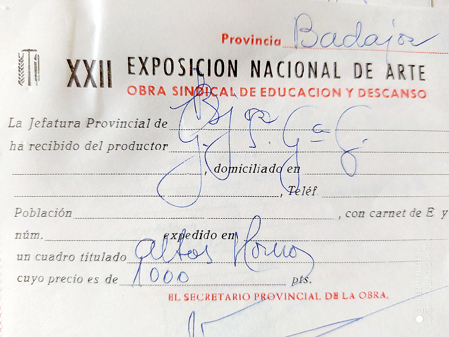 XXII Exposición Nacional de Arte de la Obra Sindical de Educación y Descanso. Palacio de Espartero. Logroño, 10-25 de junio de 1964 (doc. 05).